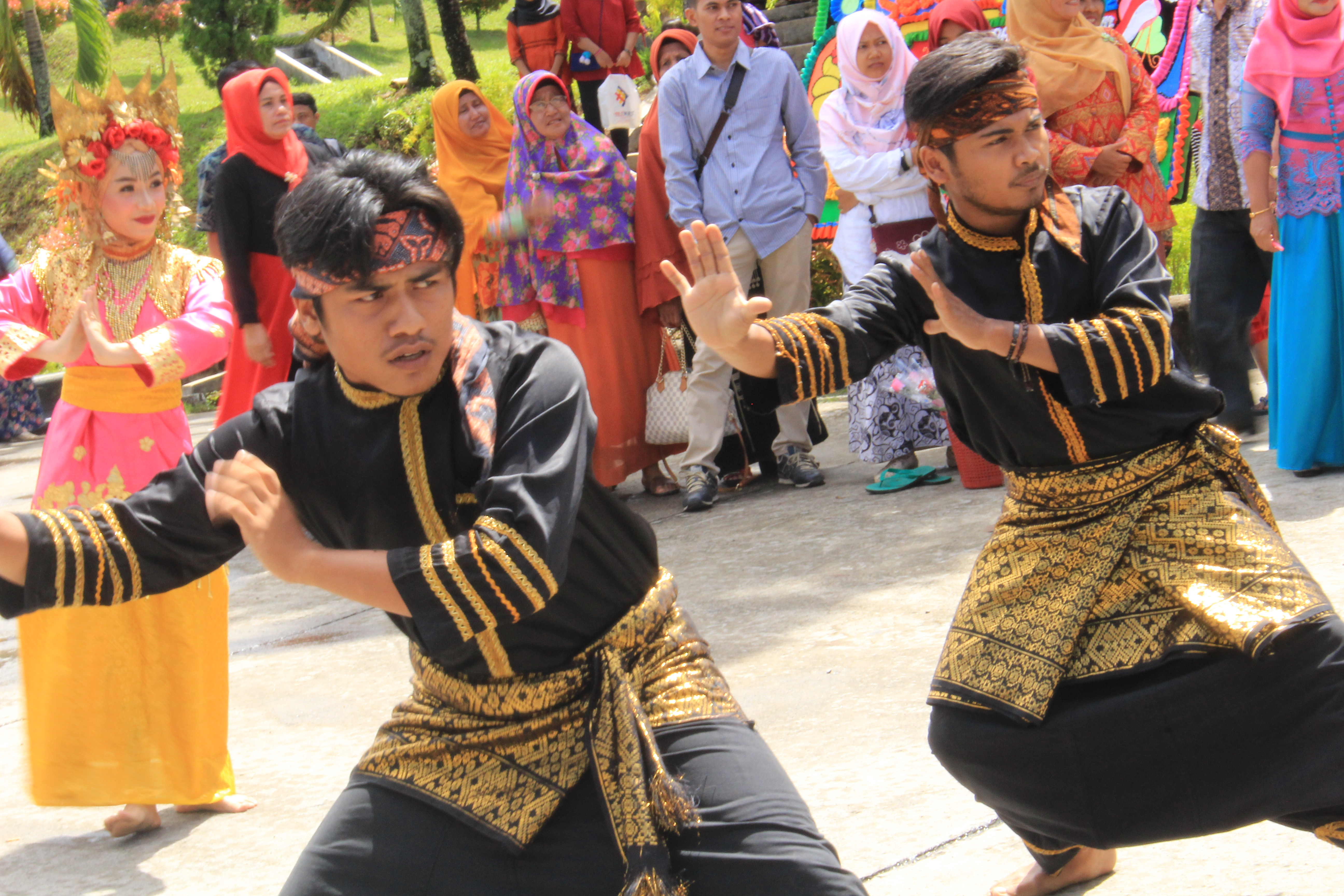 silek galombang di iringi dengan tarian galombang. tradisi adat Mnangkabau jika menyambut kedatangan tamu kehormatan.